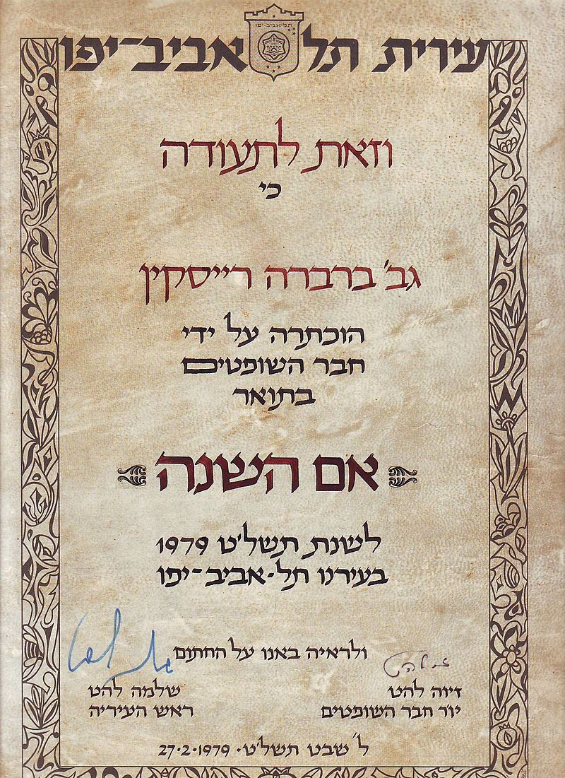 ייִדיש: "אם השנה", ה'תשל"ט